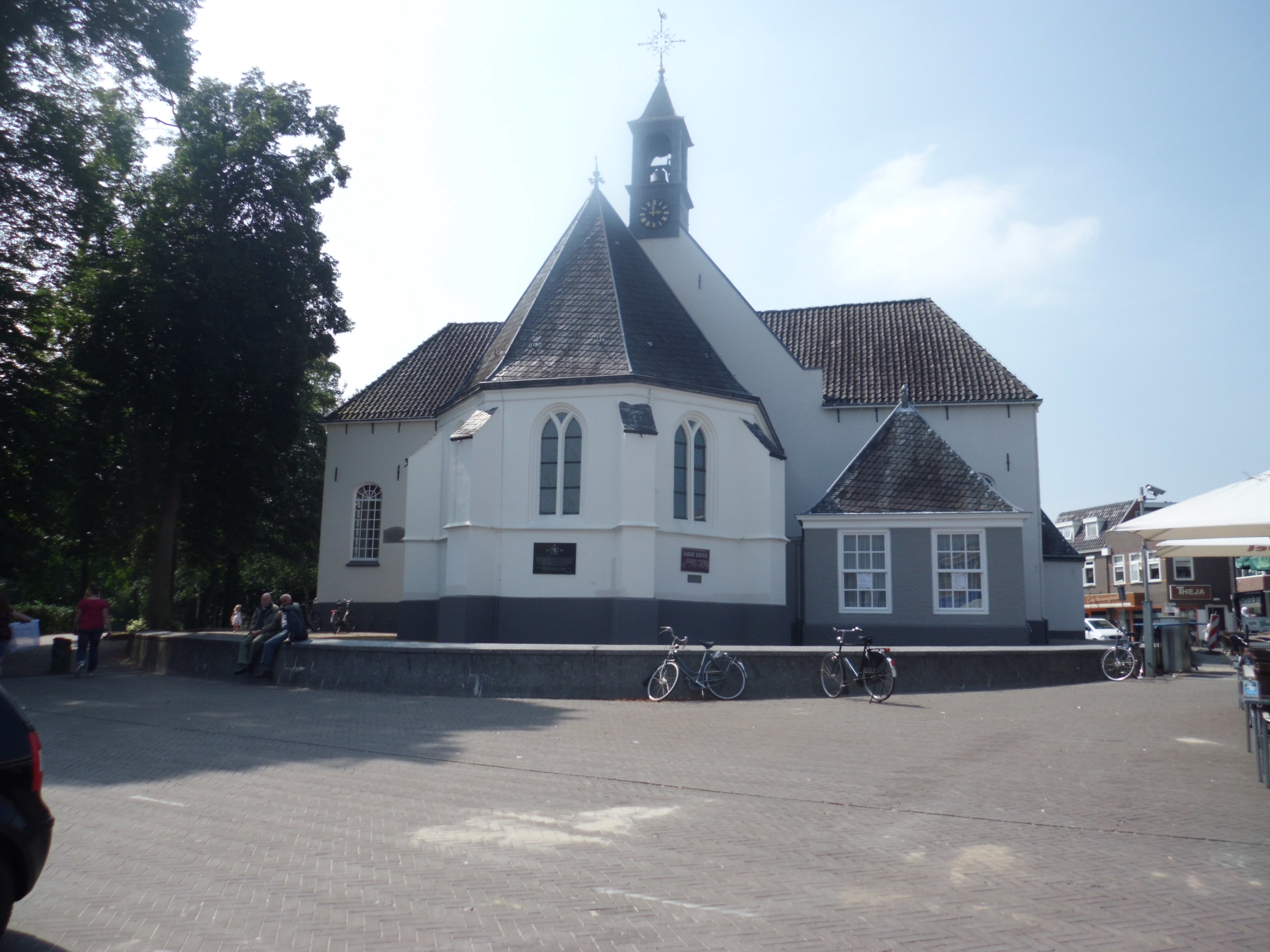 Markt 9B